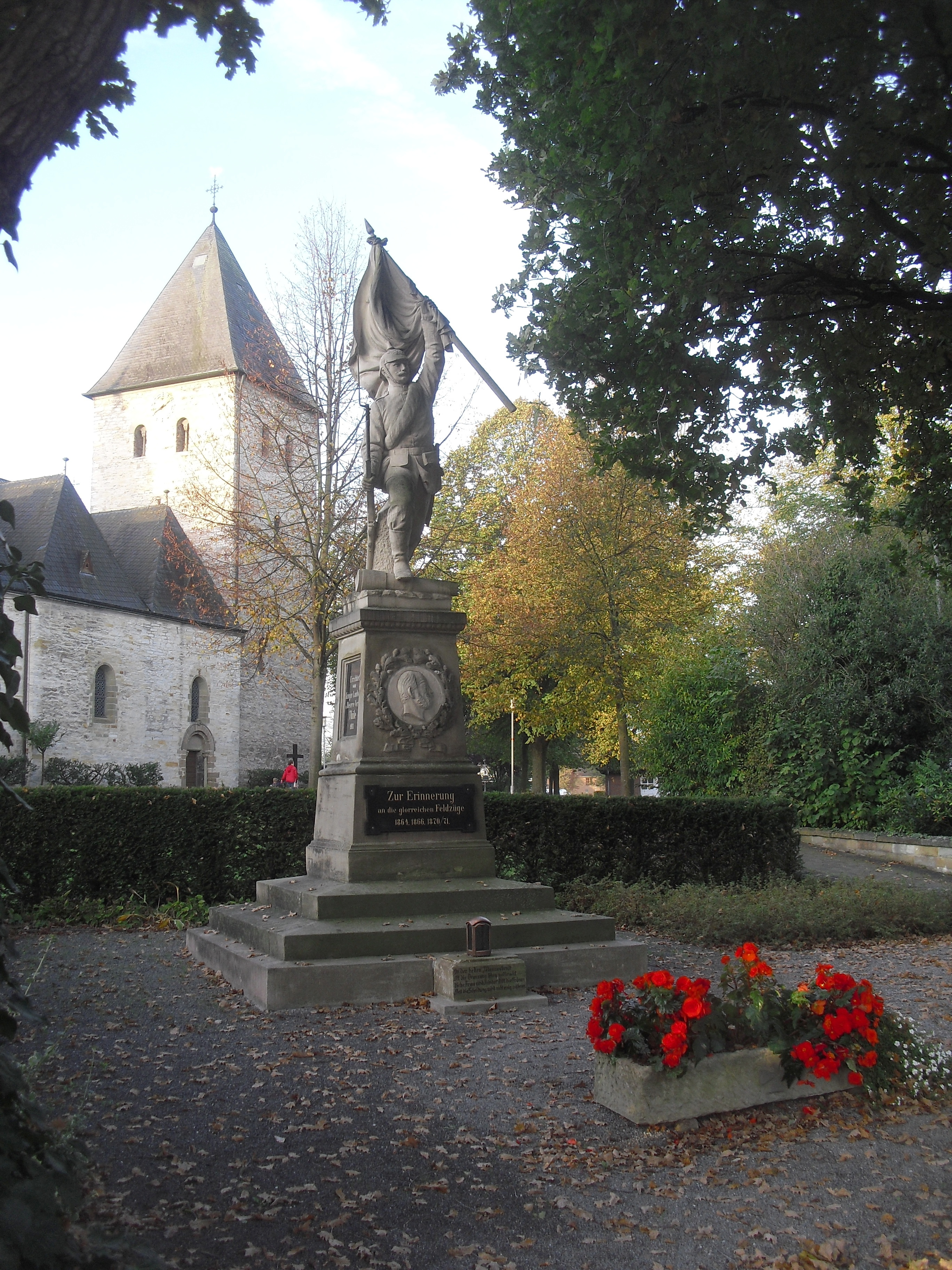 Kriegerehrenmal in Thüle für die Gefallenen der Kriege von 1864, 1866 und 1870/71. This is a photograph of an architectural monument.